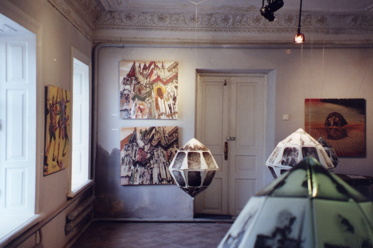 Карась Галерея виставка Дмитра Кавсана "Сни Назавжди" 1995 року.